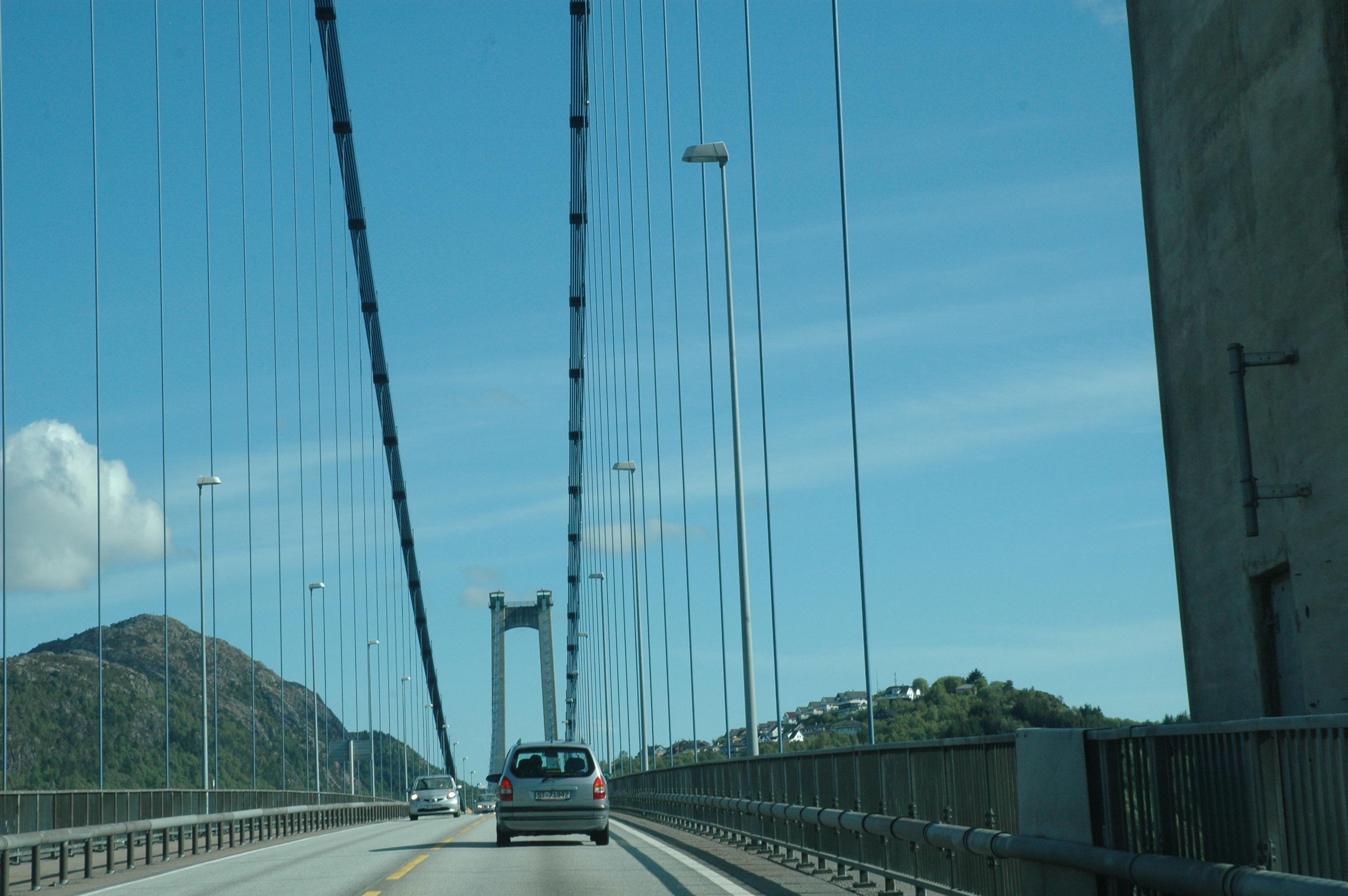 Over Askøybrya